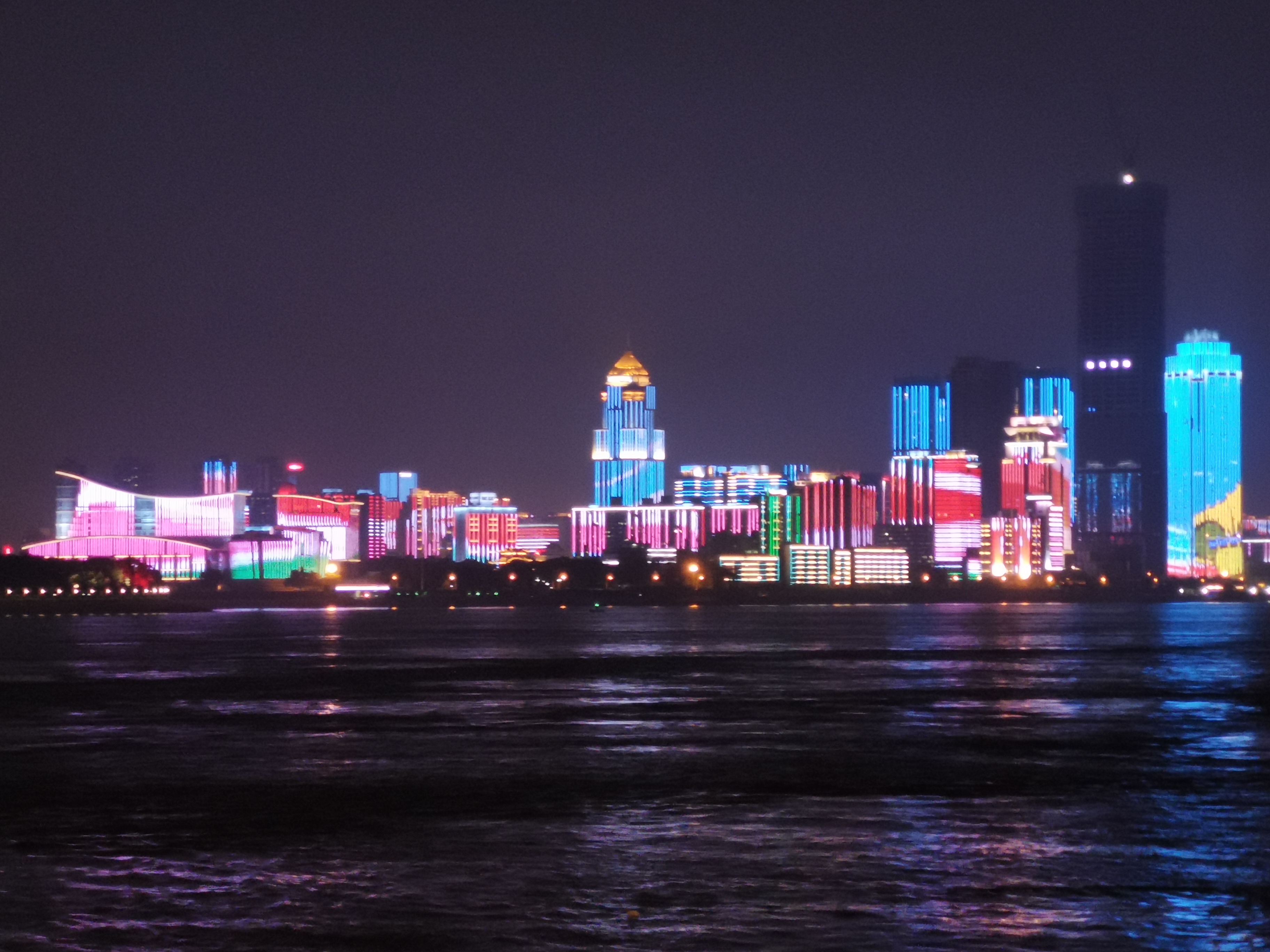 中文（中国大陆）: 武汉长江大桥下步行街对对岸远眺的江景图